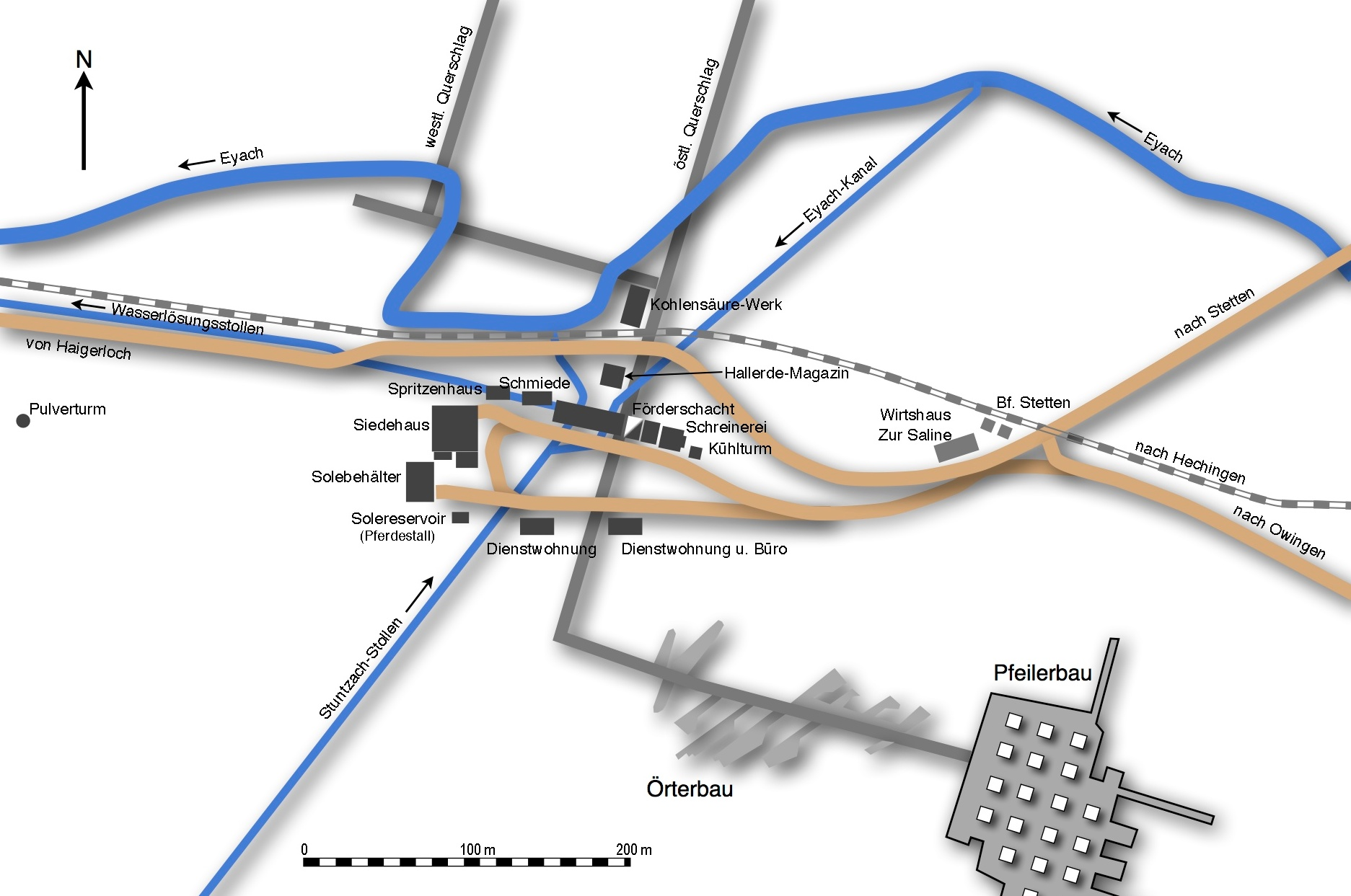 Lageplan der früheren Tagesanlagen mit Salinengebäuden. Untertage Nördliche Untersuchungsstrecken und Örterbau und Pfeilerbau südöstlich des Schachtes. Stand etwa 1924.